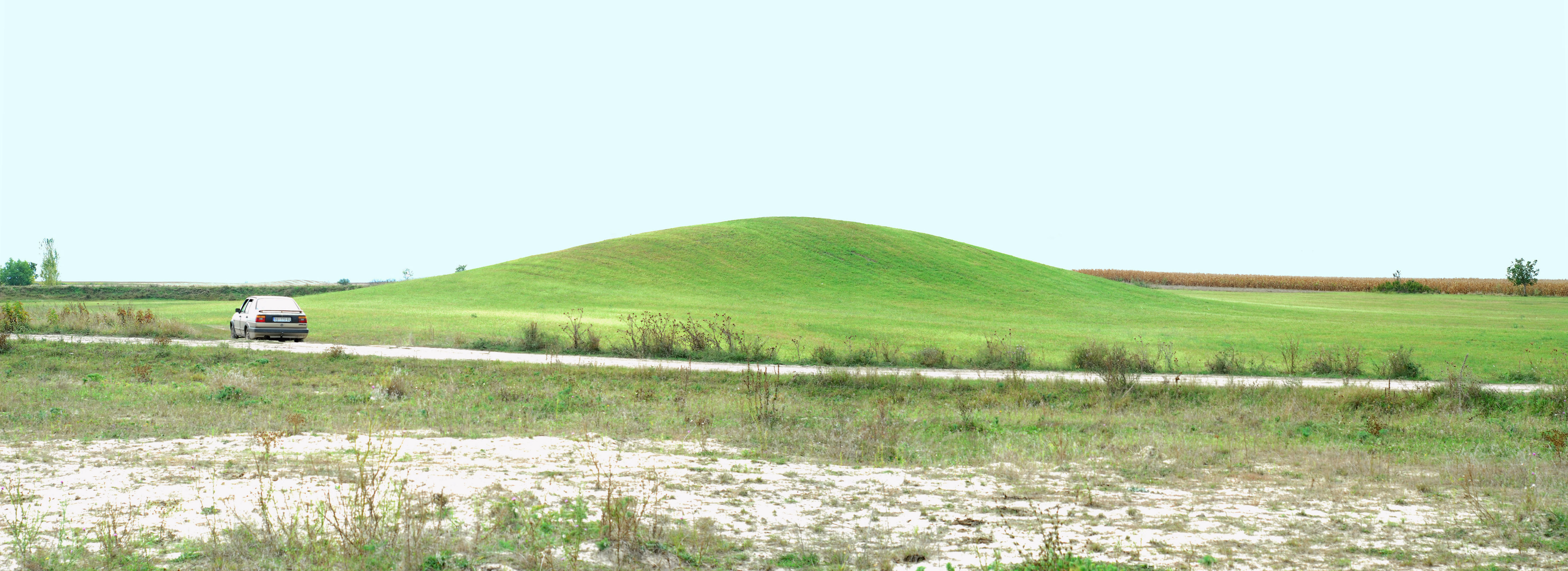 Српски (ћирилица): BAC805 "Хумка Стари Жабаљ"